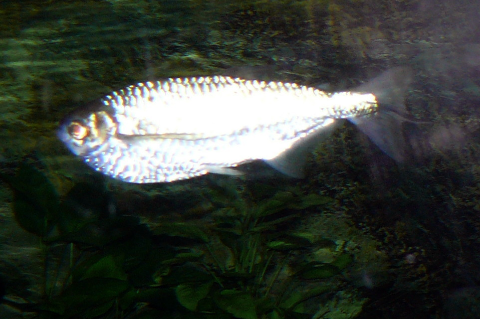 Armbrustsalmler (Triportheus angulatus)